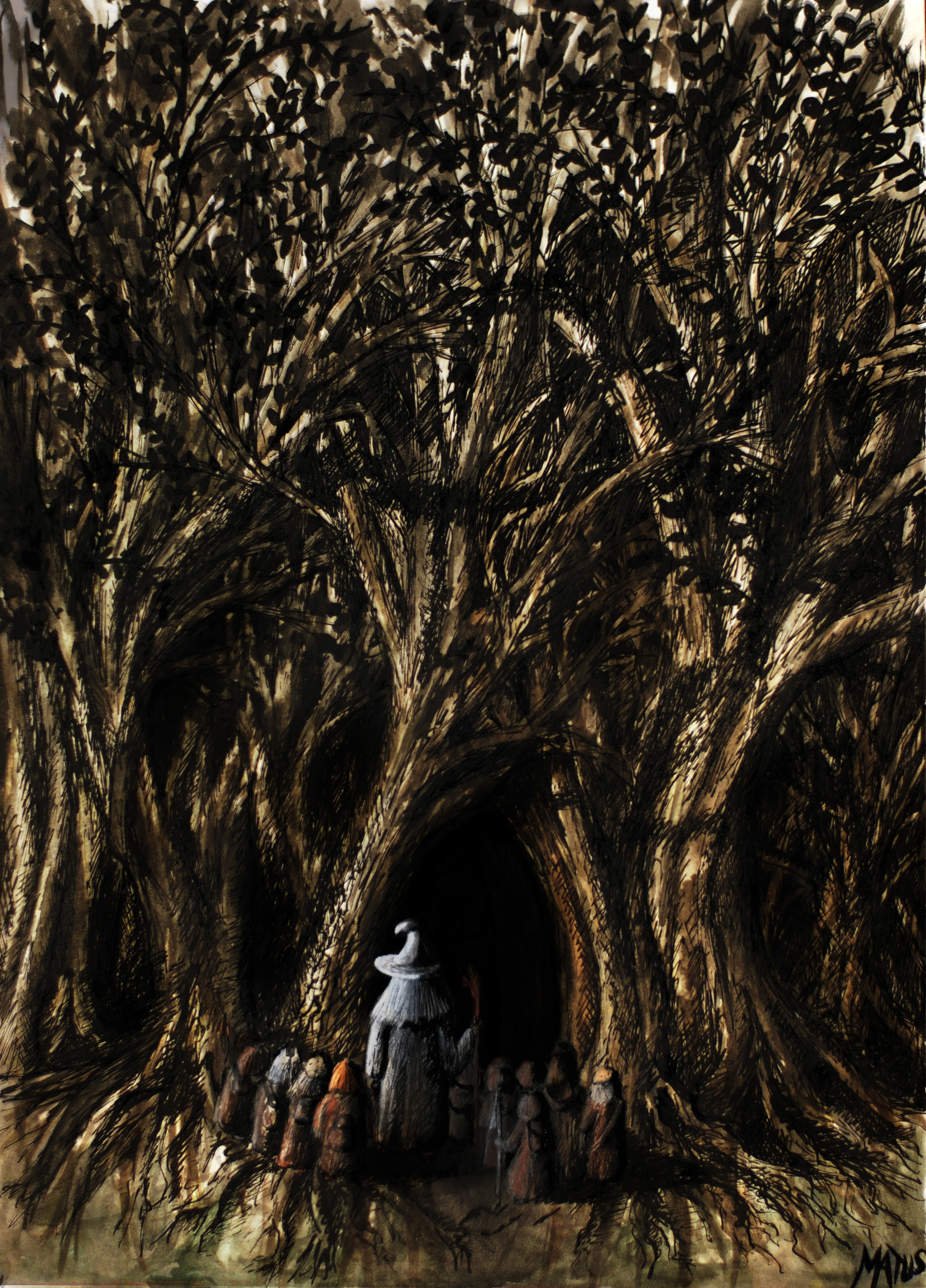 Temný Hvozd - vstup